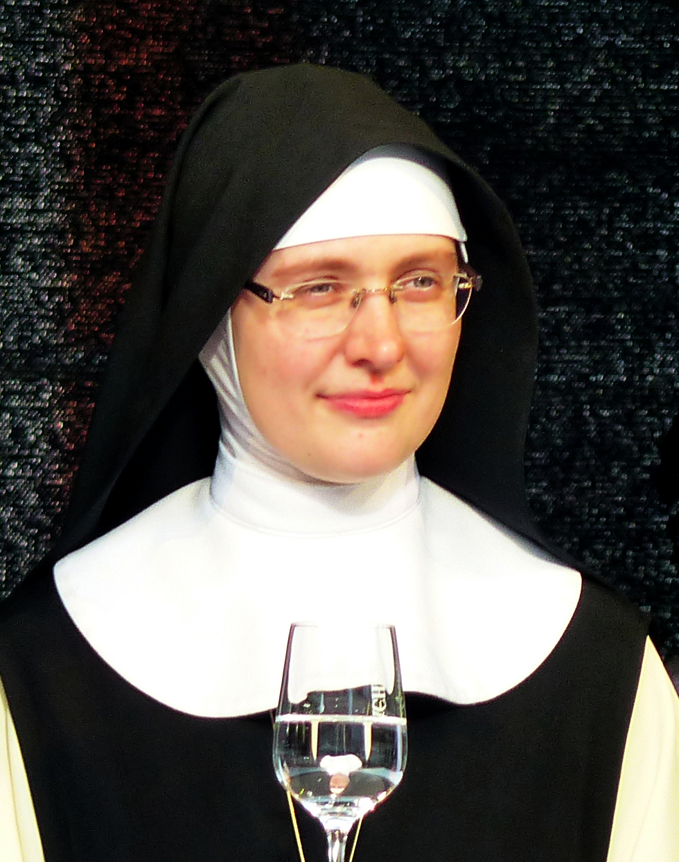 Philippa Kraft, Äbtissin, Kloster St. Marienstern, Panschwitz-Kuckau, 11. Juli 2014